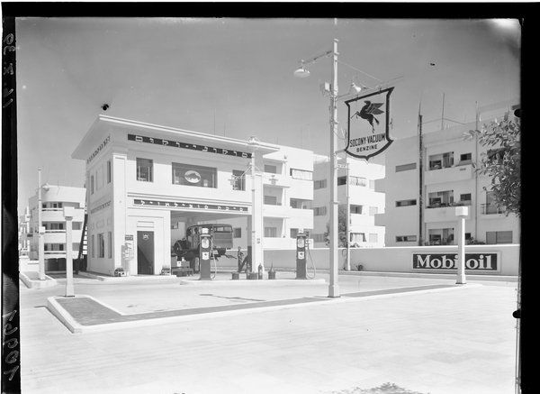 חברת סוקוני ואקום - Socony Vacuum Oil Company, תחנת דלק ברחוב אלנבי, תל אביב